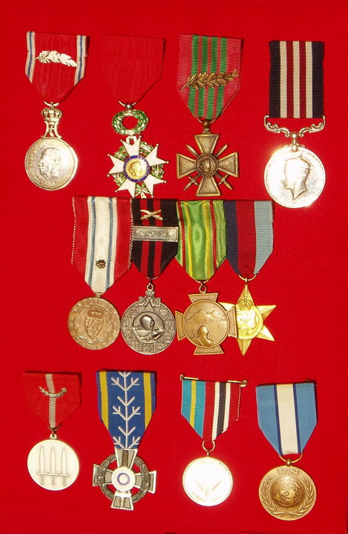 Allan Mann decorations